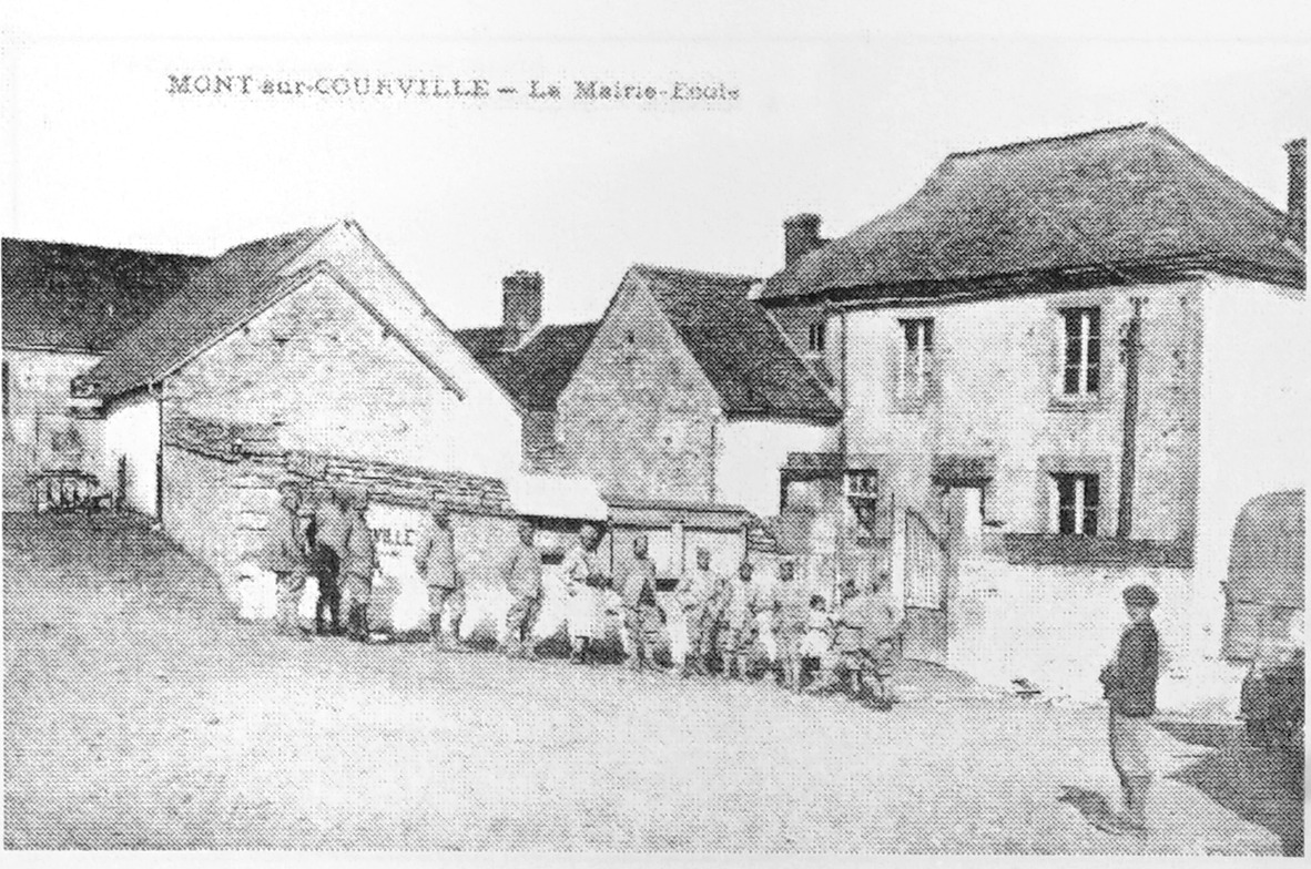 sur une vue ancienne.